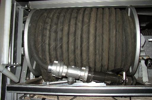 Schnellangriffseinrichtung